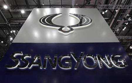 Логото на Ssang Yong Motor Company SsangYong Motor